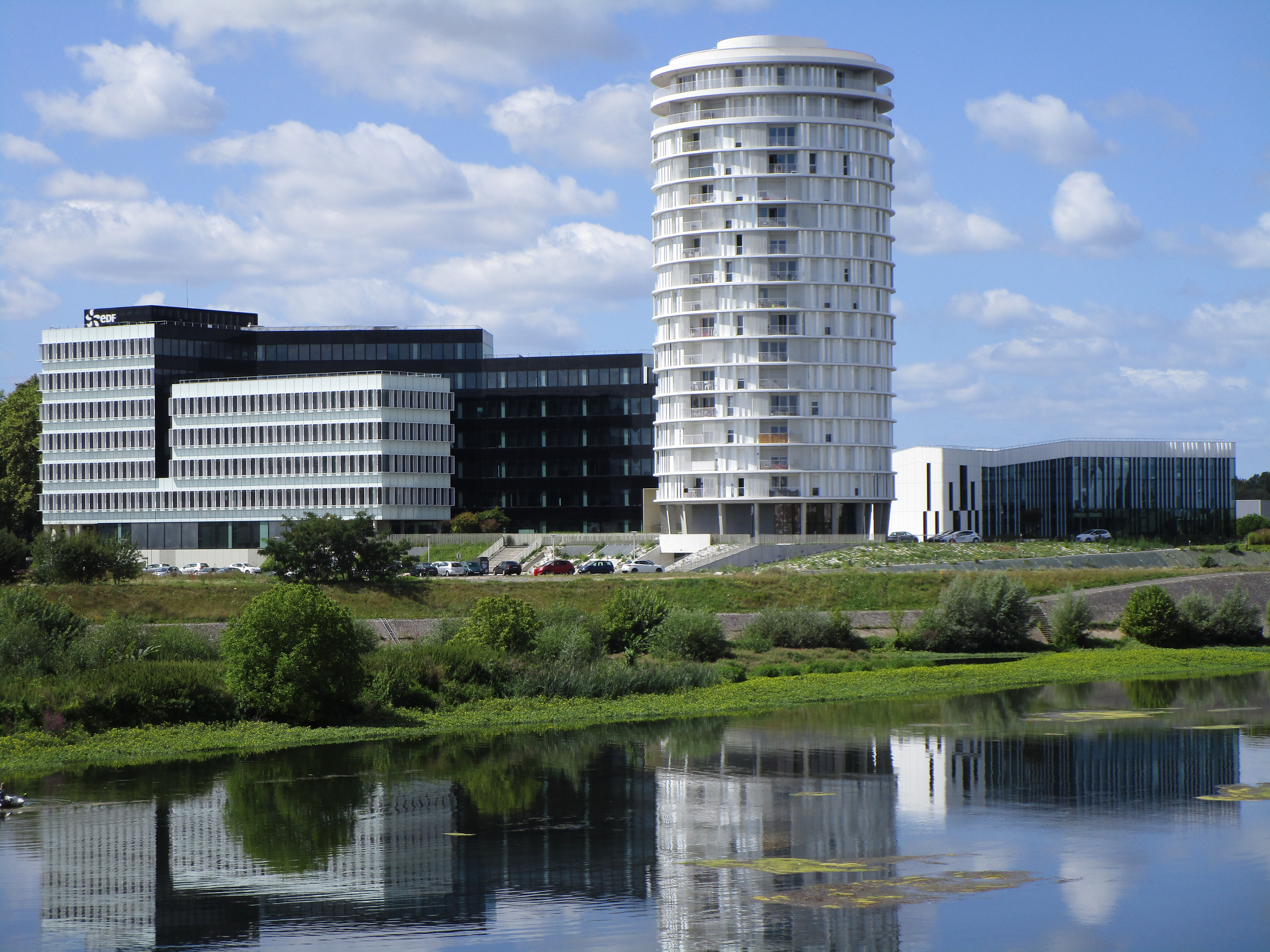 Vue de la Tour lumière à droite et des bâtiments administratif d'EDF à gauche, depuis le pont de Vendée. Quartier des Deux-Lions à Tours.